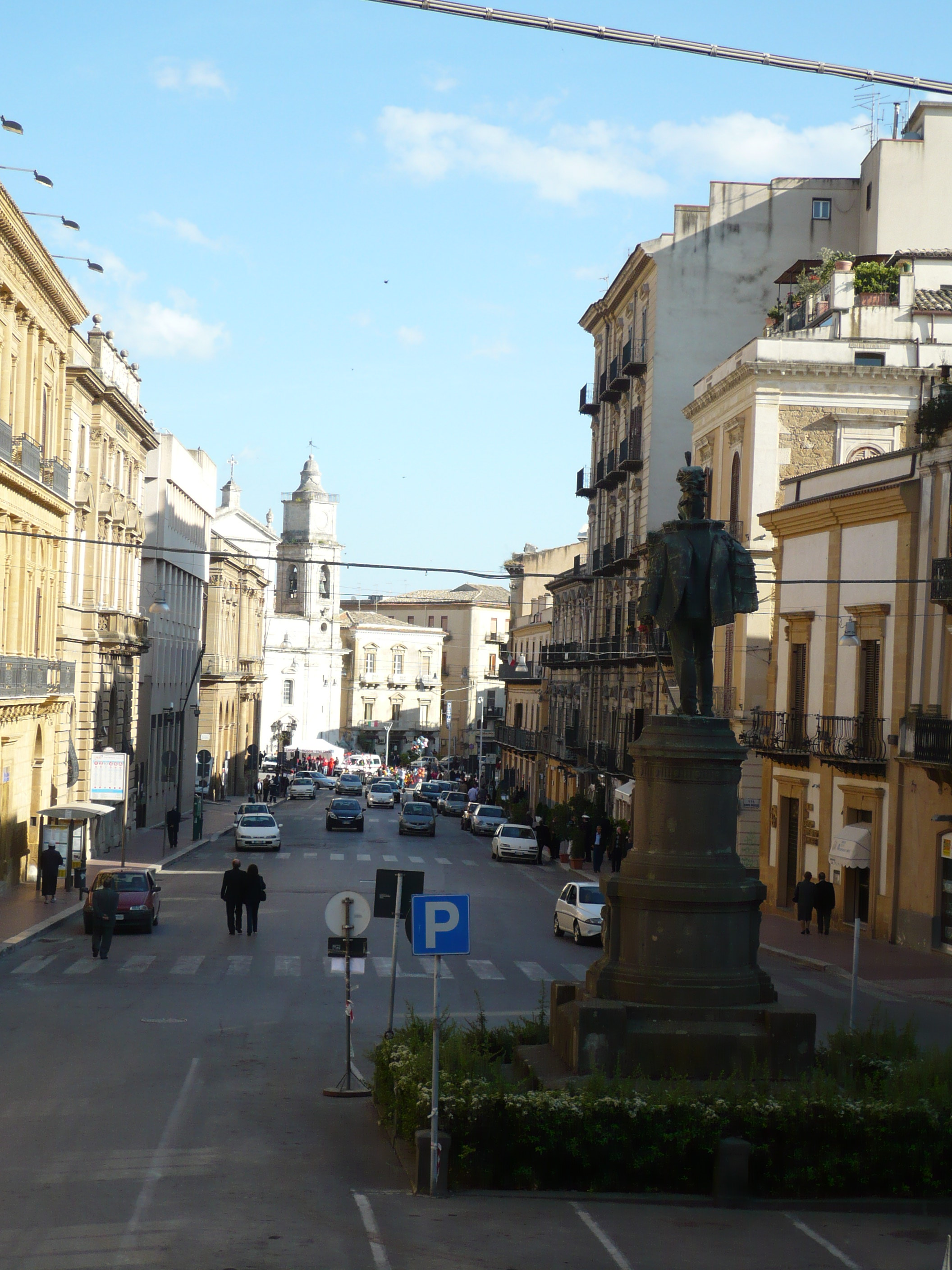 Monumento ad Umberto I a Caltanissetta, fuso in bronzo dall'artista Michele Tripisciano nel 1911, collocato nell'omonima strada nel 1922.